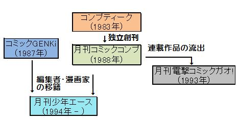 少年エースの誕生の経緯を図にまとめたものです。